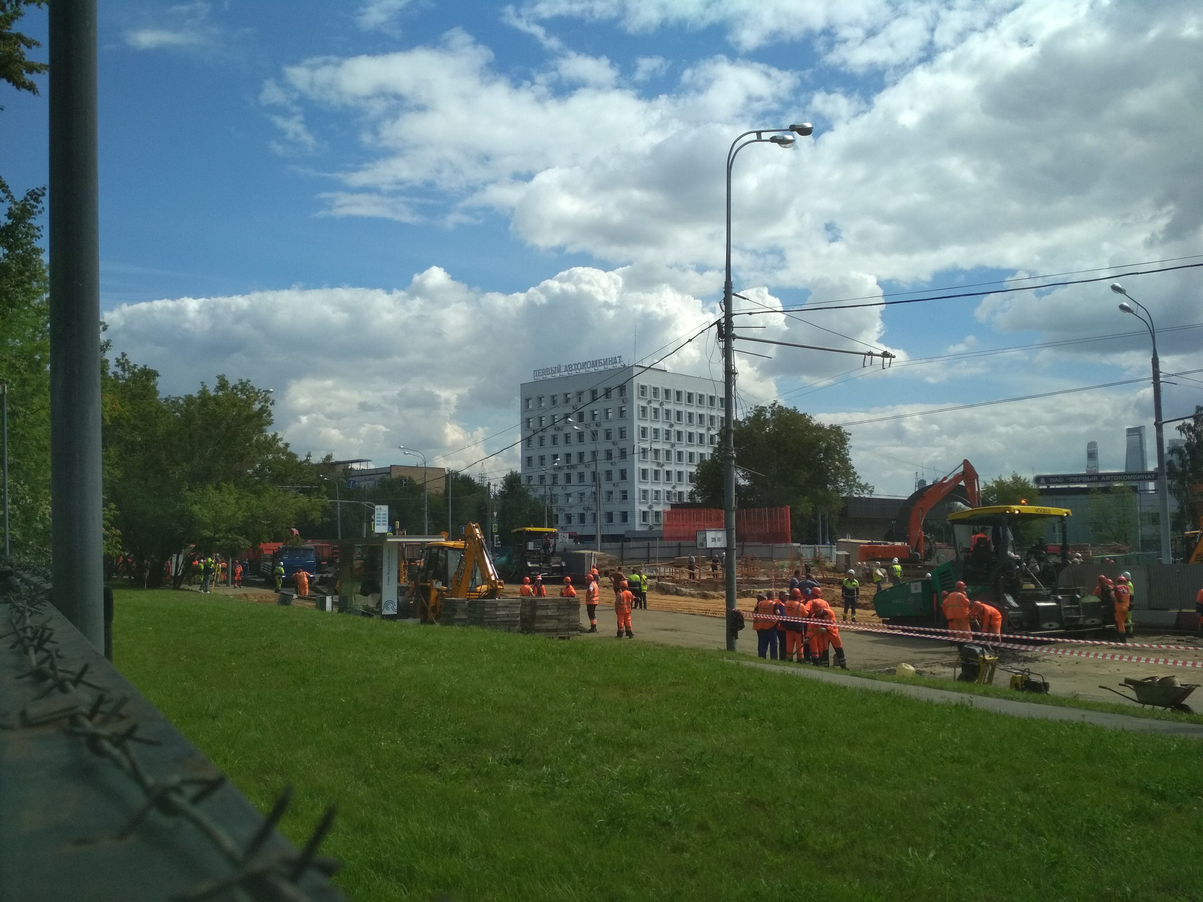 Работы на месте провала грунта при строительстве Большой Кольцевой линии, Москва, проспект Маршала Жукова